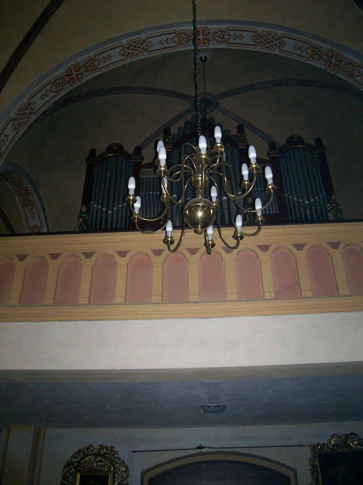 Kościół pw. Najświętszej Marii Panny w Krowiarkach: chór i organy